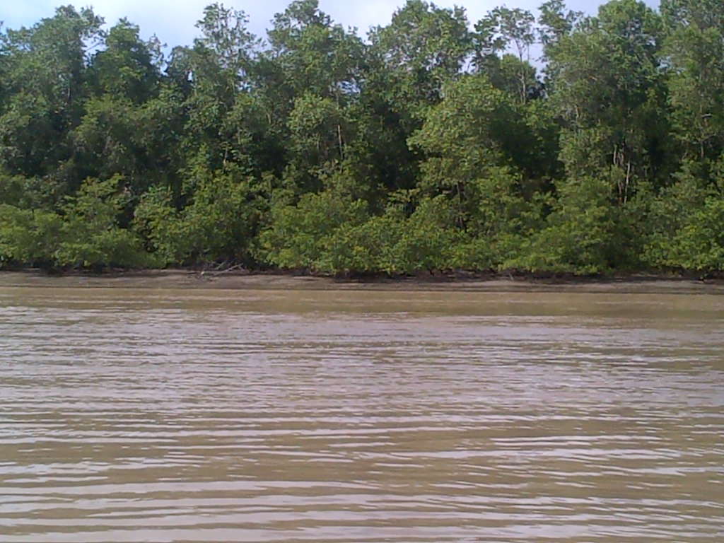 Mangrovebos aan de kust van Braamspunt